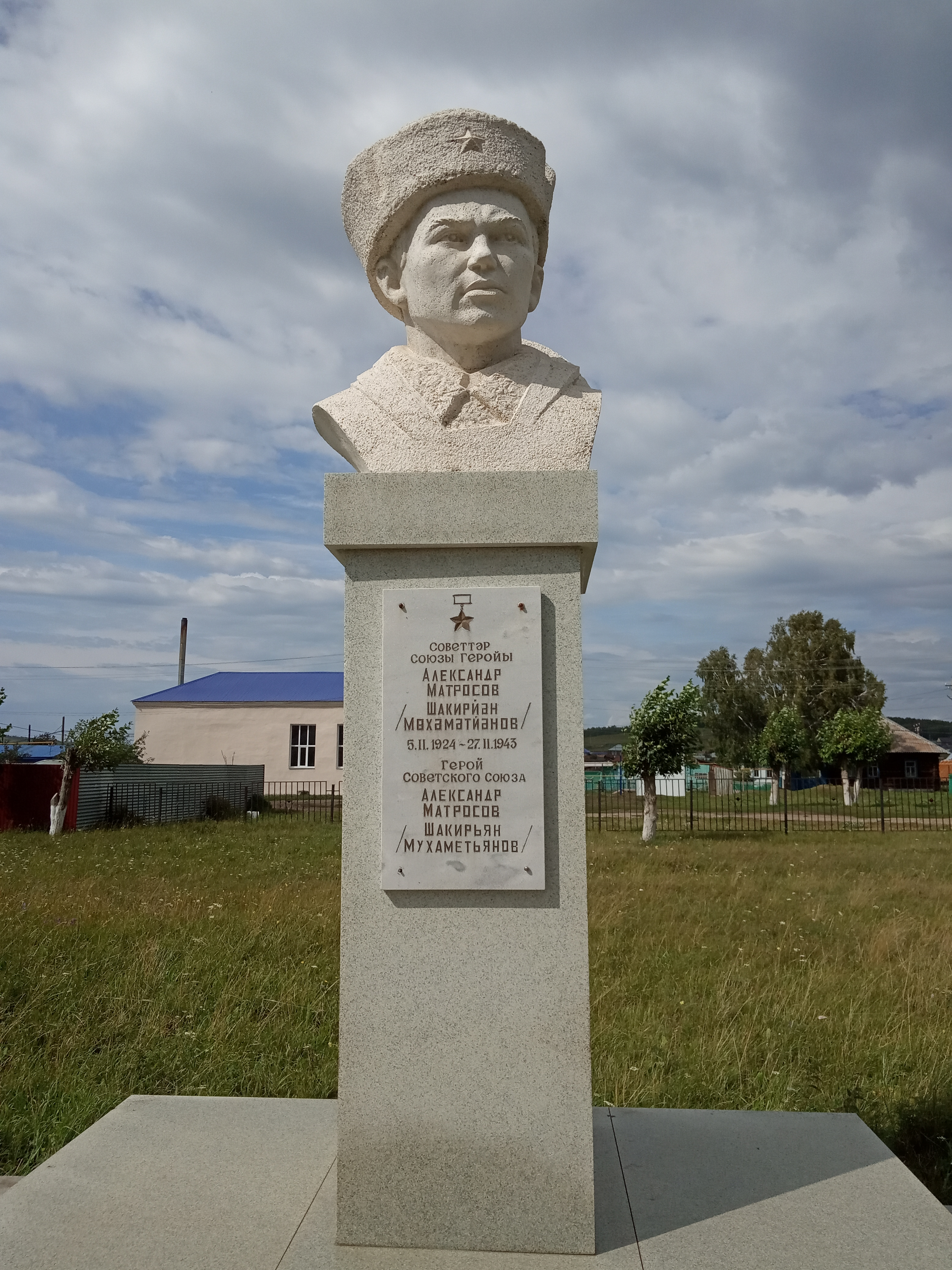 Памятник Александру Матросову в селе Кунакбаево Учалинского района респ.Башкортостан